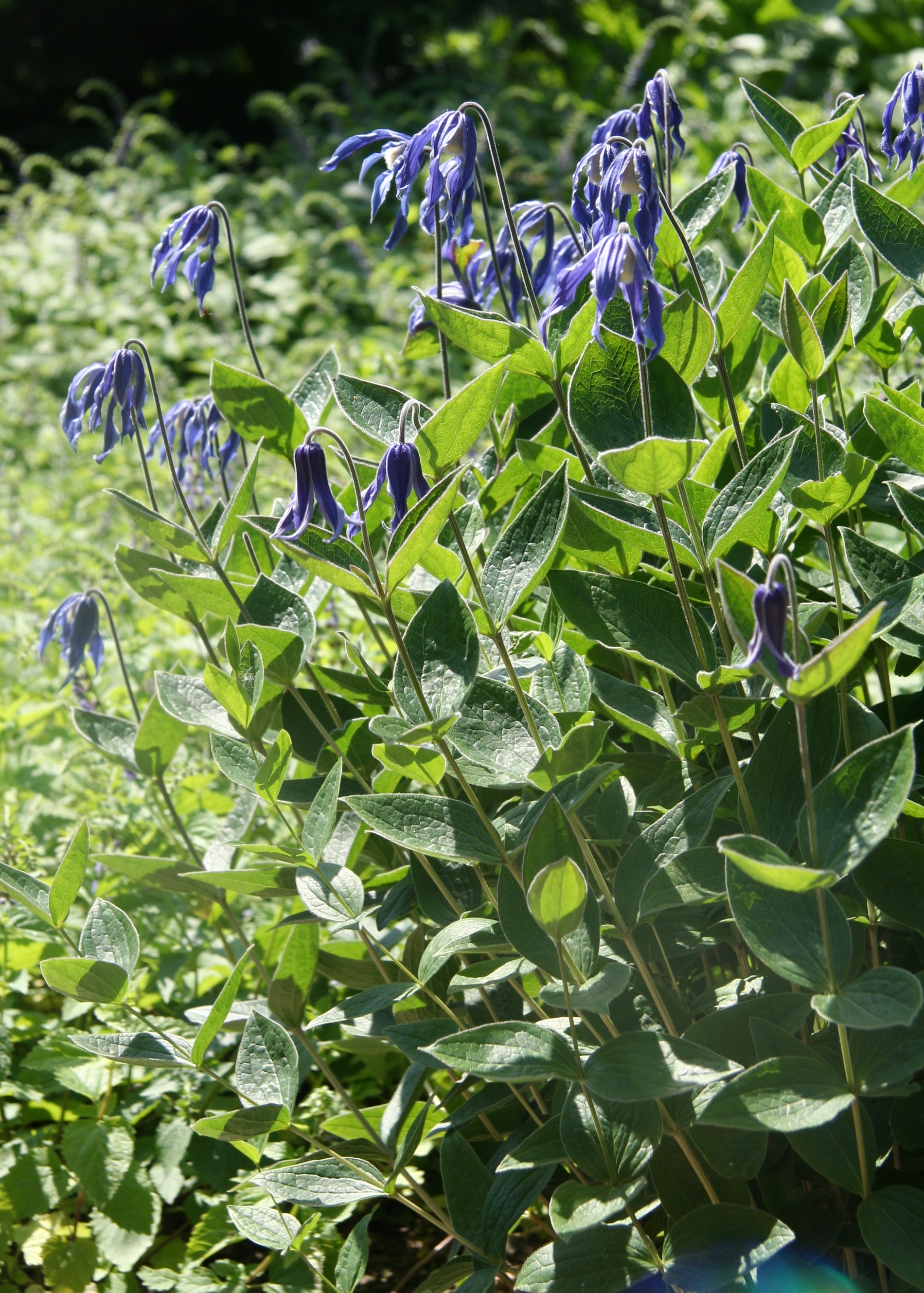 Clematis integrifolia im Botanischen Garten Dresden